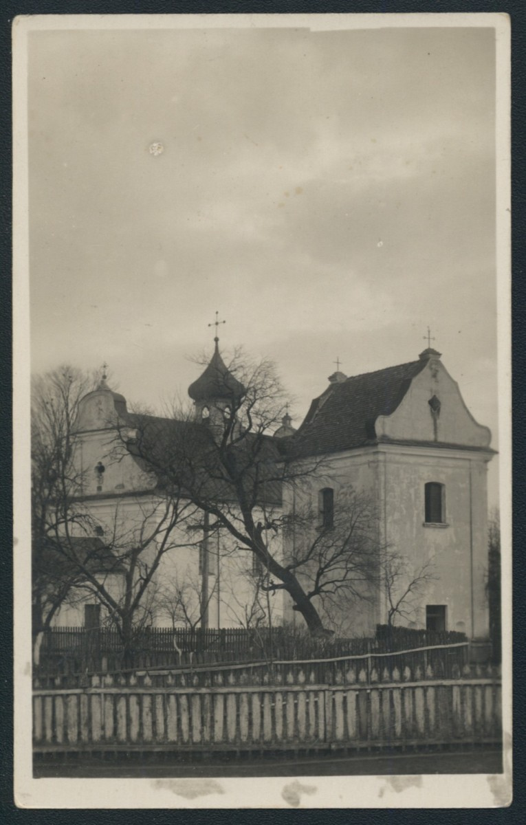 Luboml, kościół par. pw. Św. Trójcy 1934. Pocztówka.jpg: Костел Святої Трійці в Любомлі. Поштова листівка, видана в 1934 році